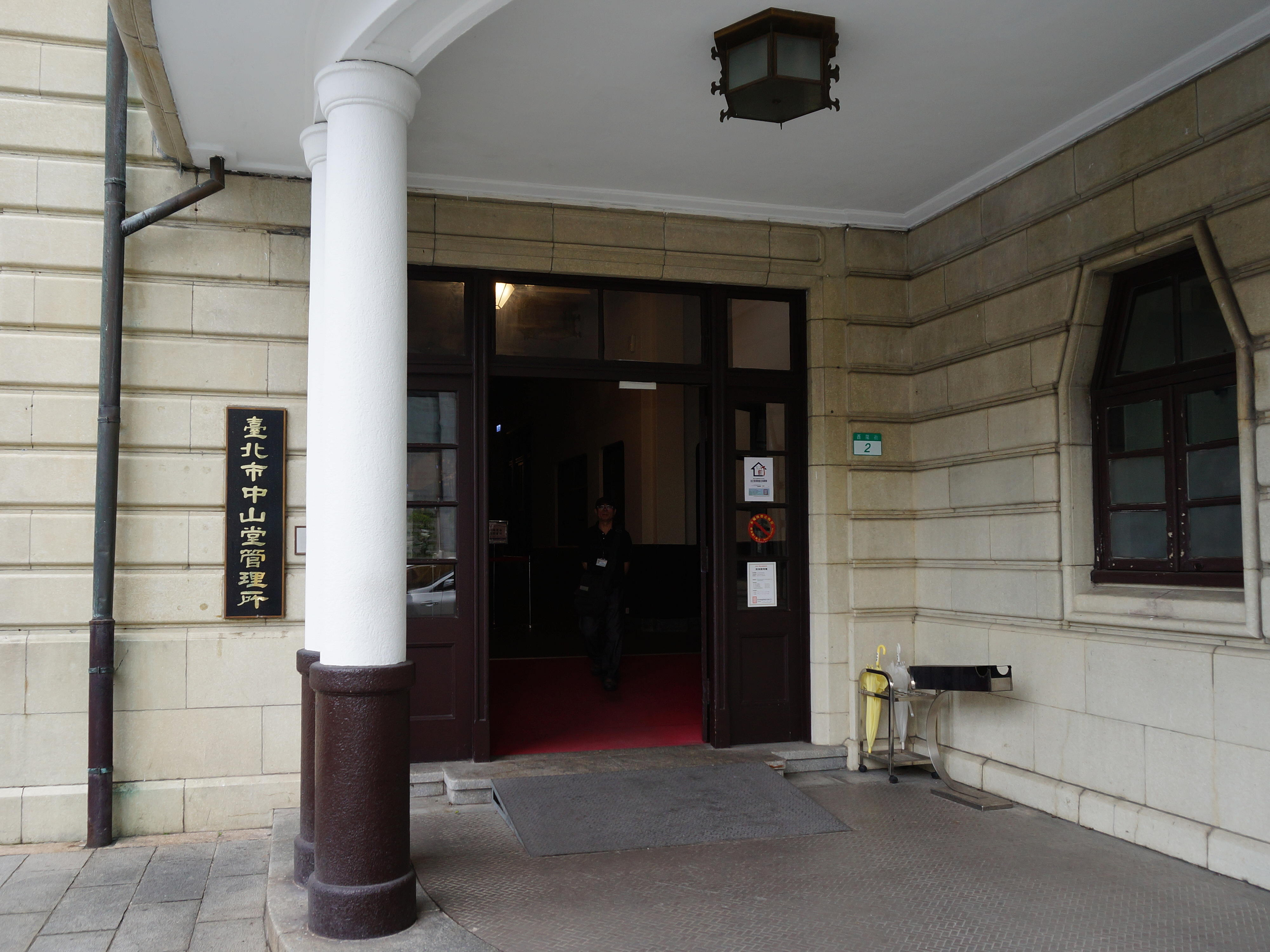 臺北市中山堂管理所，地址：臺北市中正區酉陽街2號（臺北市中山堂北側門）。